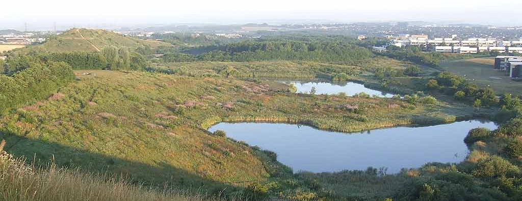 Holmstrup Sø-eng set fra Bjergkammen (del af Hasle Bakker). Forrest ses Holmstrup Marksø. Bagved Holmstrup Bassin. Uden synligt vandspejl ses øverst til højre i som en lavning Holmstrup Tørvegrav. Øverst til venstre ses Grinmøj, midt-øverst til højre ses Holmstrup Skov.